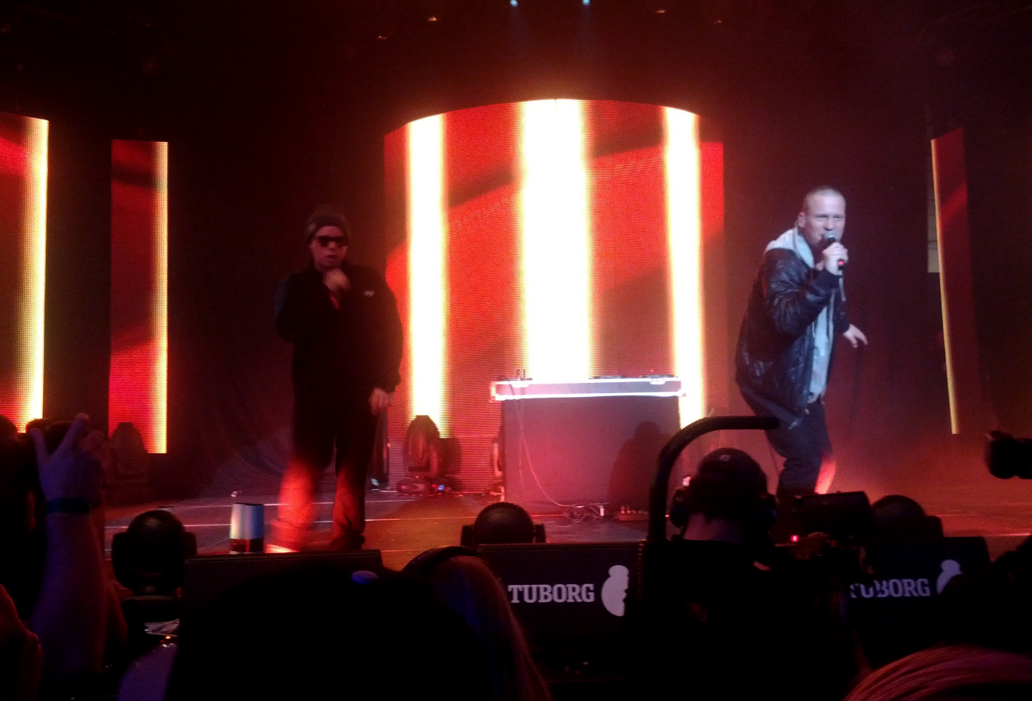 Yepha optræder med Niklas under DDJA 2012.